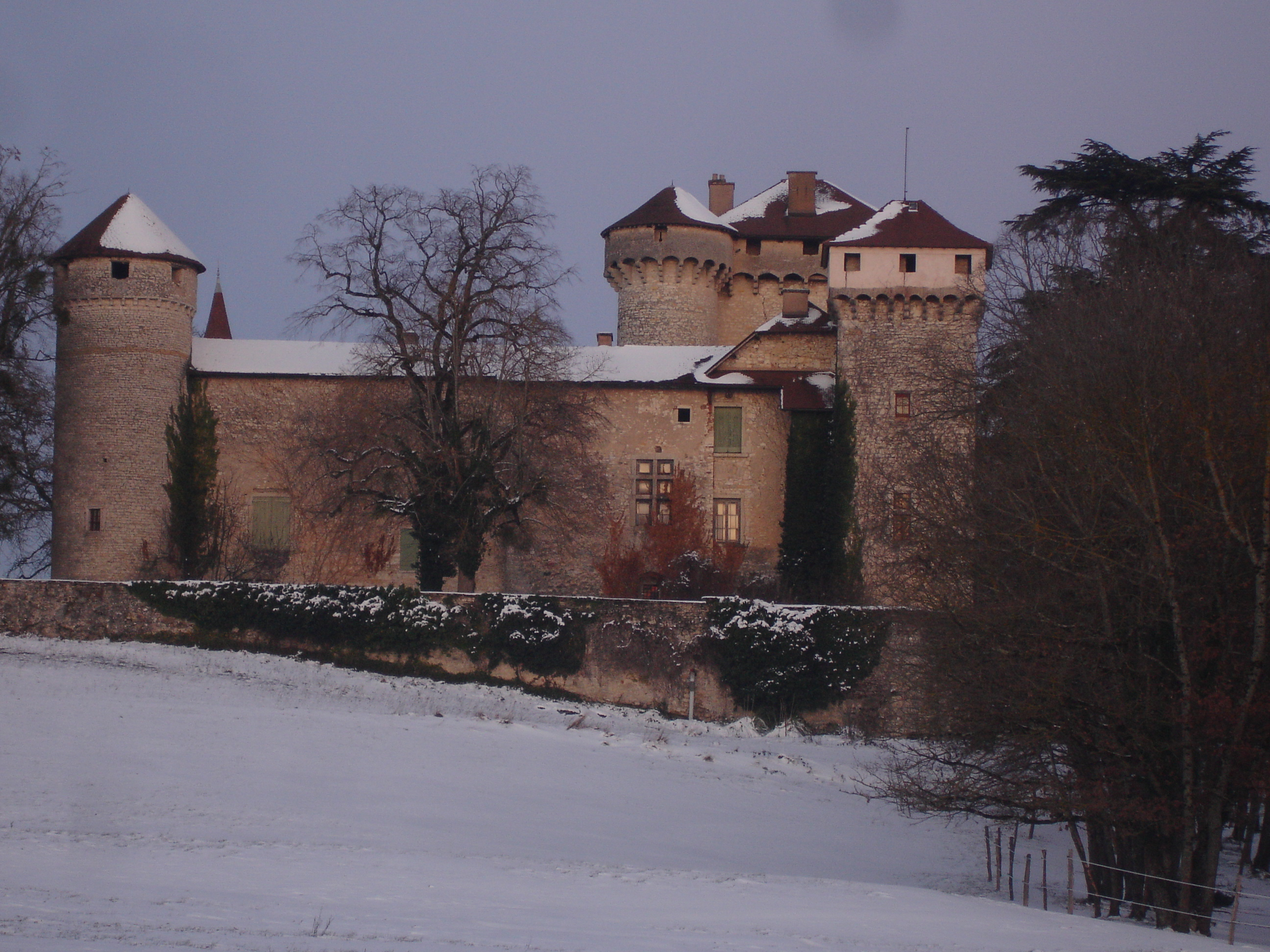 Trept (Isère) :Le château de La Poype de Serrières